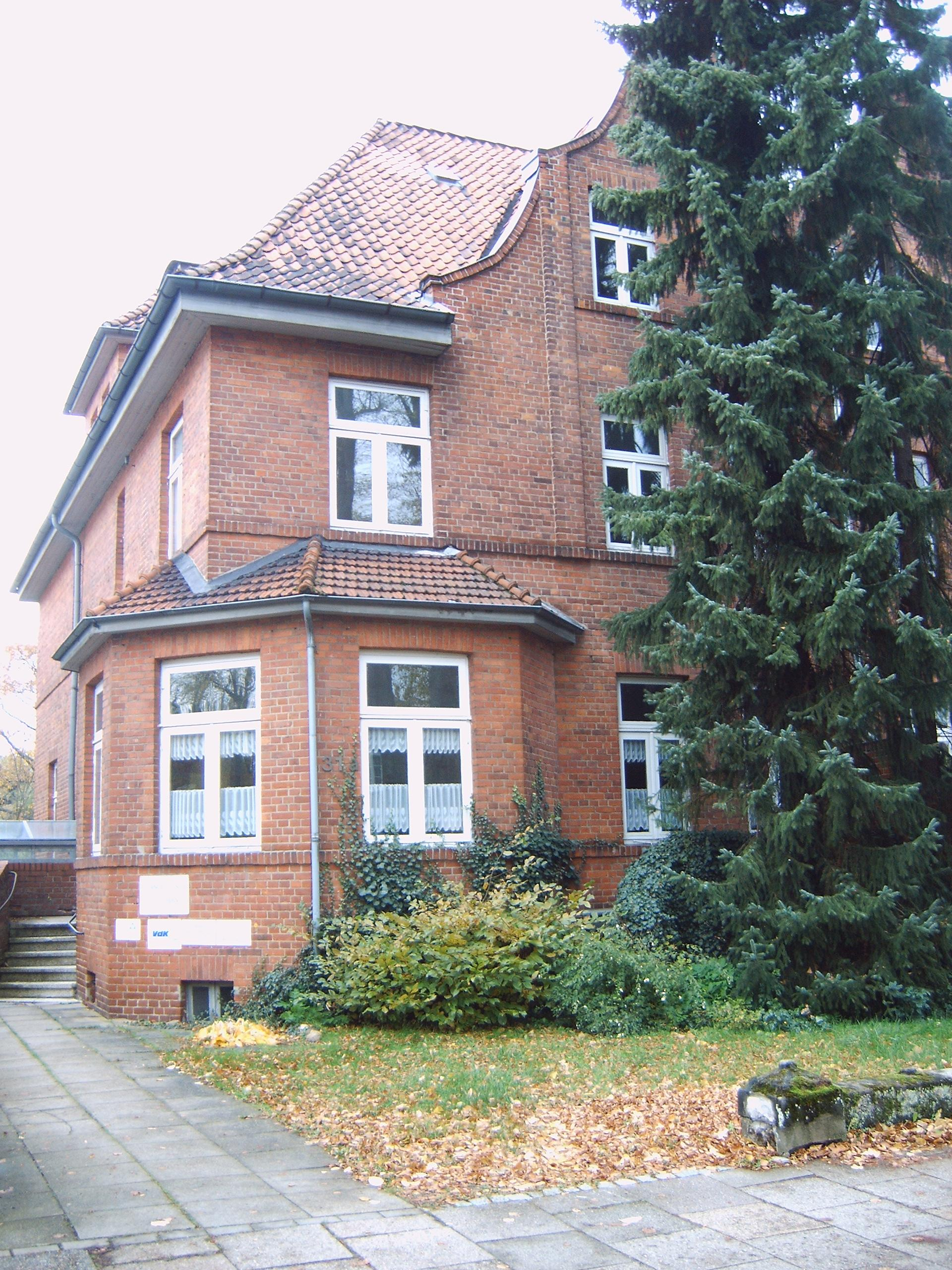 Ehemaliges Quartier des Security Force Headquarters of the British Army of Occupation in Lüneburg, Uelzener Straße 31a, das Sterbehaus von Heinrich Himmler